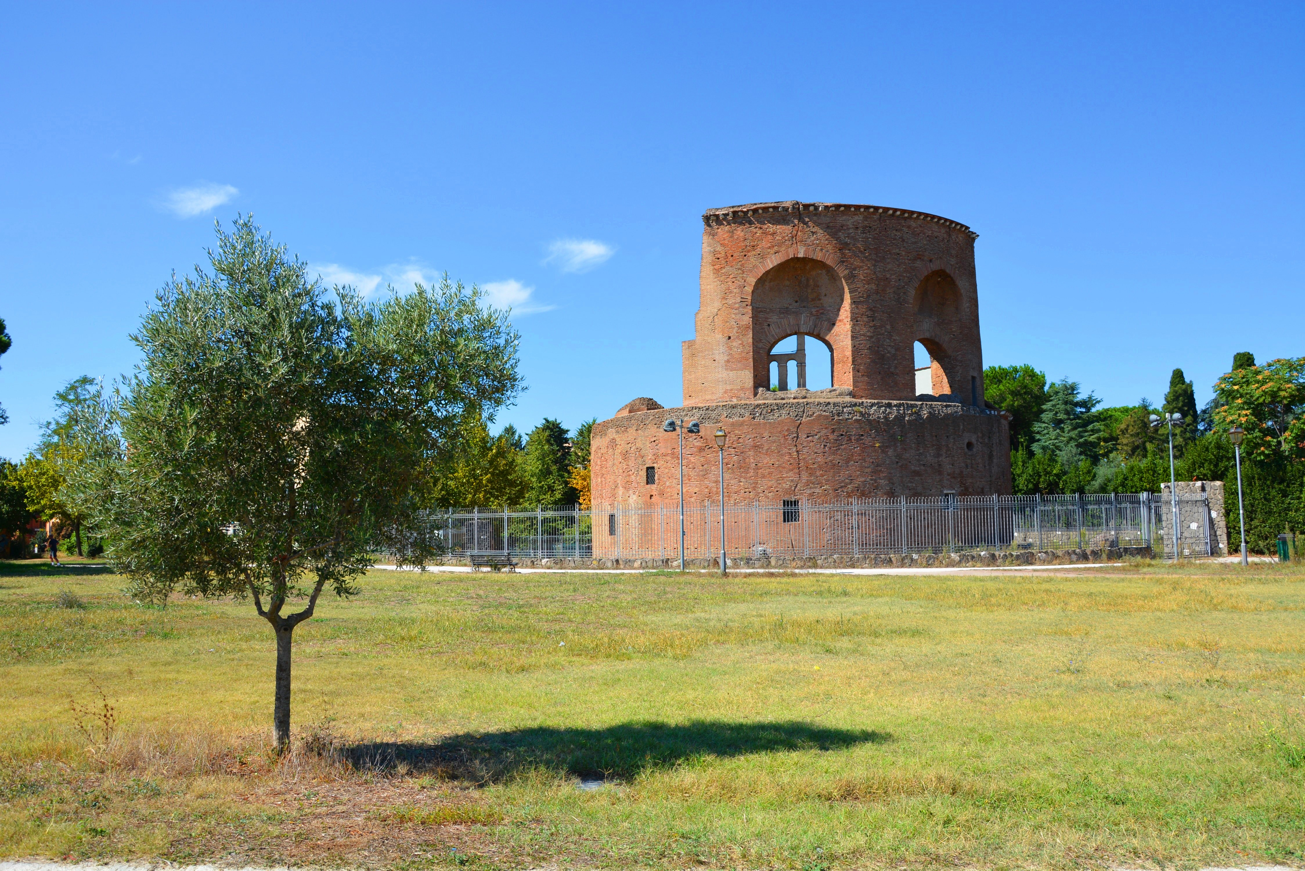 Mausoleo di Sant'Elena - Ville De Sanctis This is a photo of a monument which is part of cultural heritage of Italy.